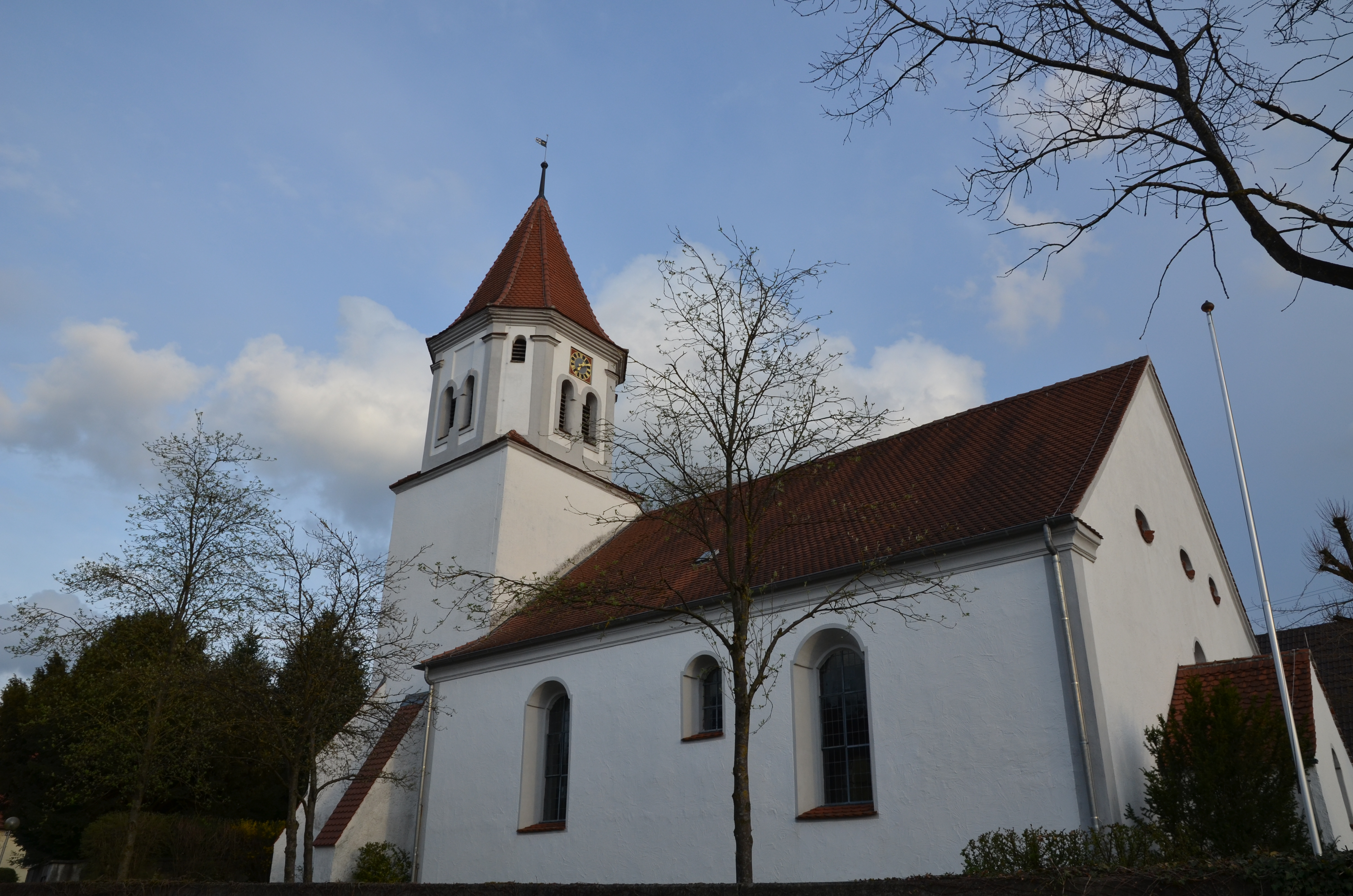 evang.-luth. Nikolaikirche in Bächingen an der Brenz